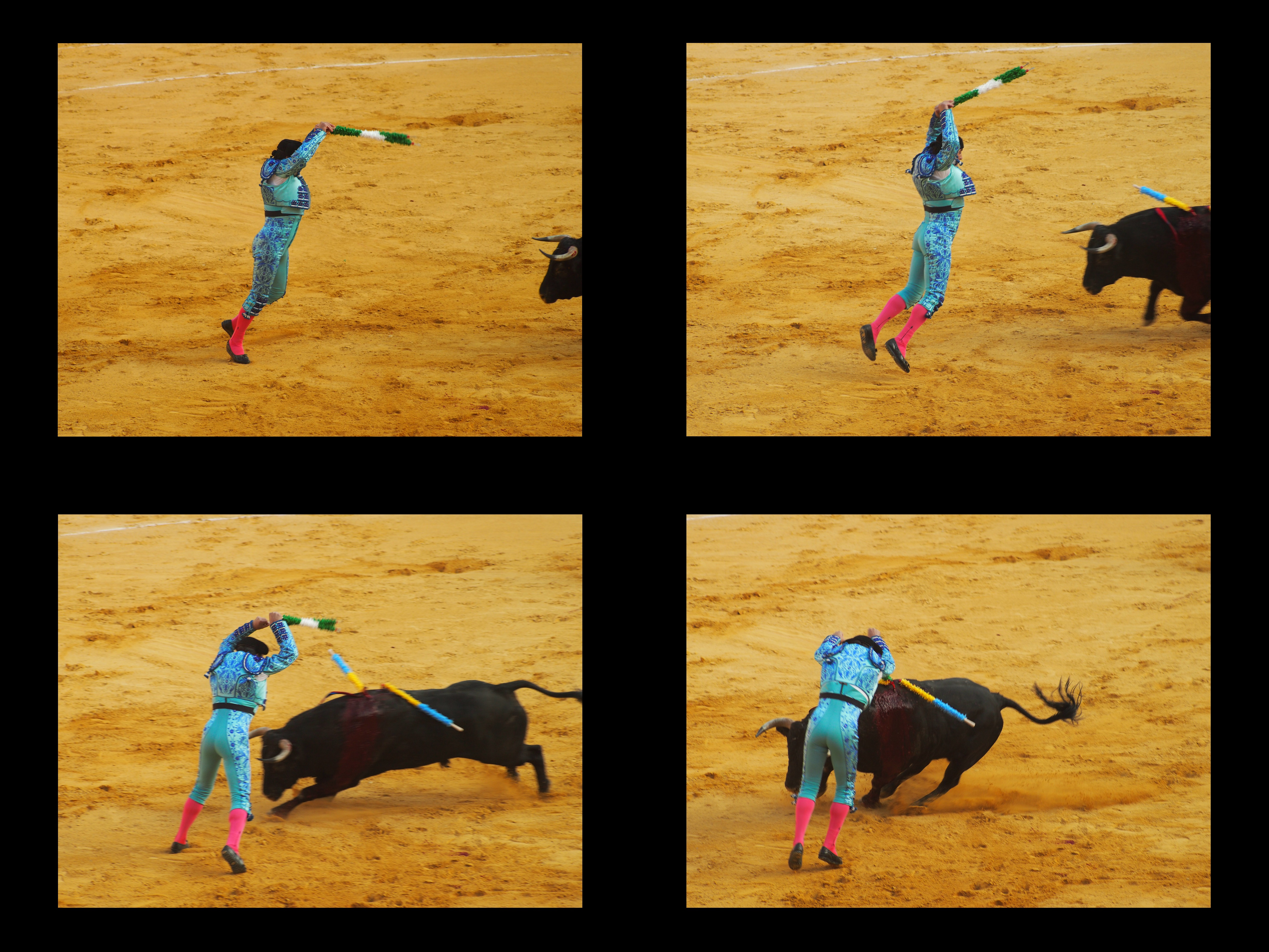 Banderillero de la cuadrilla de Enrique Ponce (Antonio o José María Tejero Muñoz-Torrero o bien Alejandro Escobar). Toro de la ganadería Zalduendo. Corrida de toros en Palencia, viernes 31 de agosto de 2012.